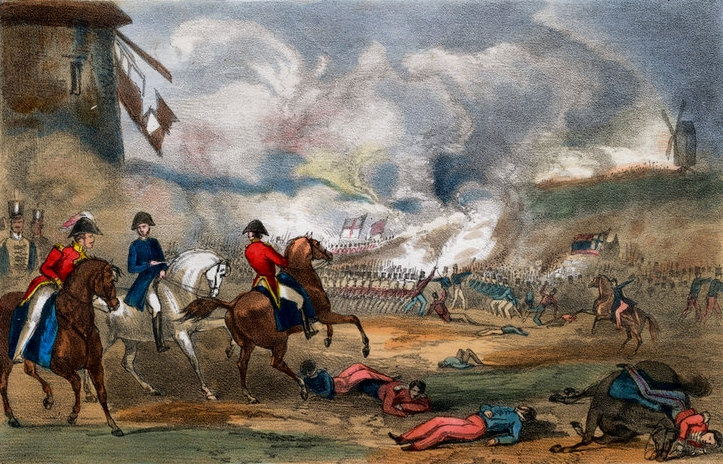 Le 9e régiment d'infanterie britannique à la bataille de Roliça, 17 août 1808.